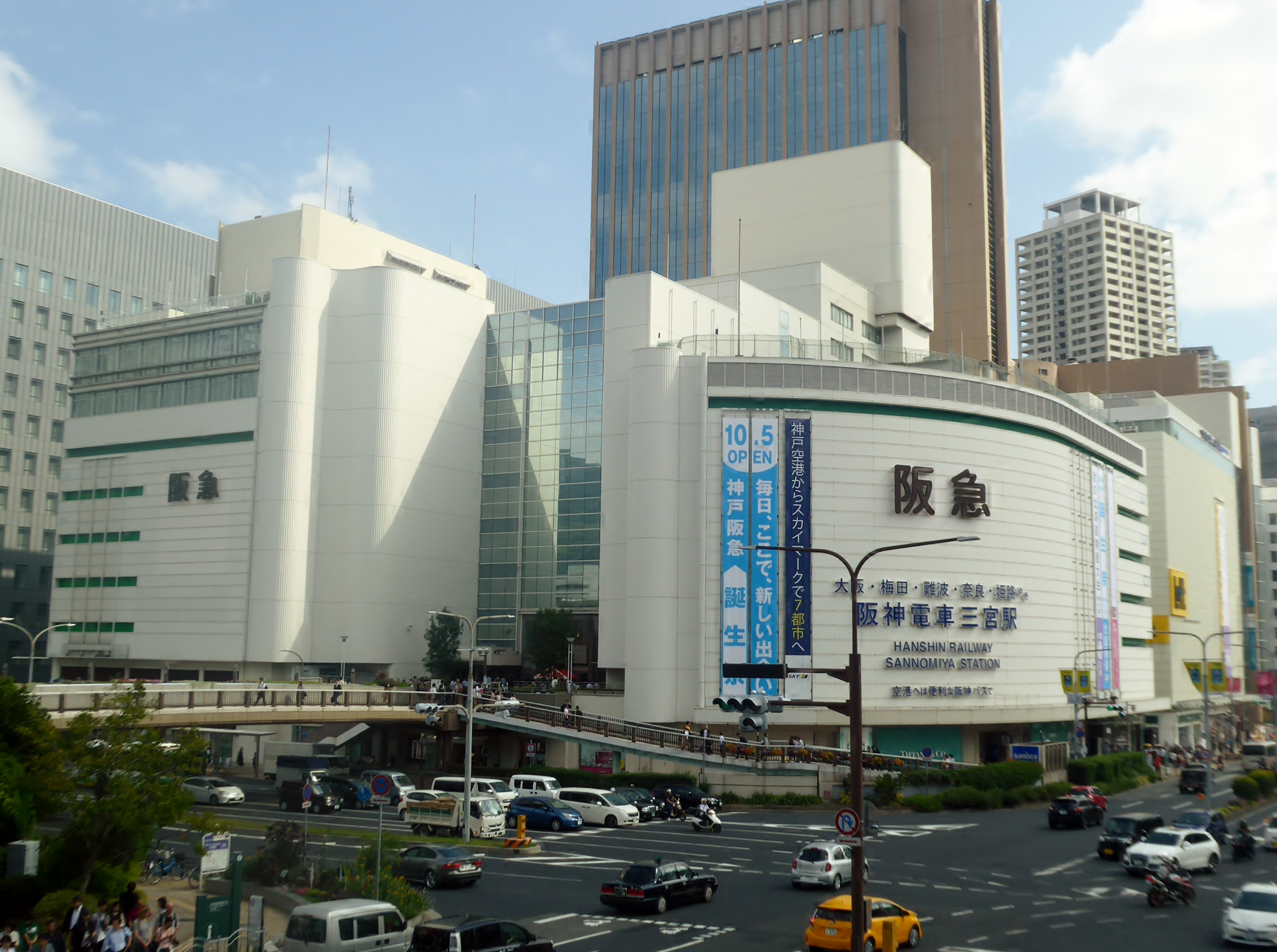 神戸阪急を撮影。